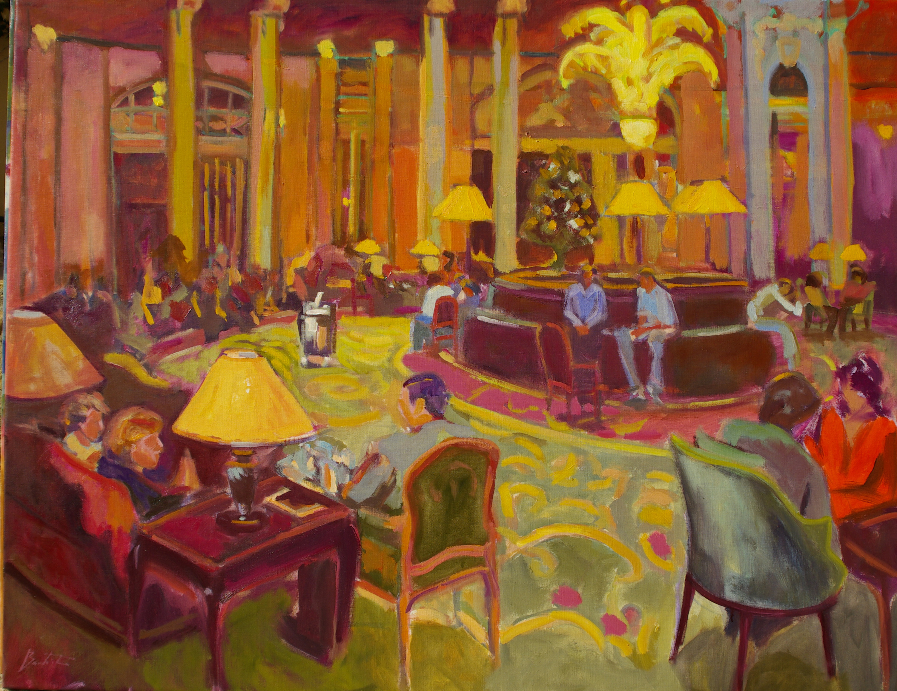 Obra de José Bautista sobre el Hotel Palace de Madrid de 146 x 114 cm. al óleo/lienzo